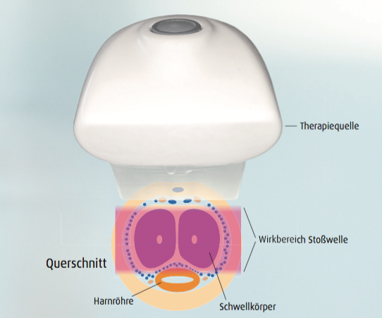 Wirkbereich linienförmige fokussierende Piezo-Stosswelle. Die mechanische Wirkung der Stosswelle auf die Schwellkörper (Corpus cavernosum)